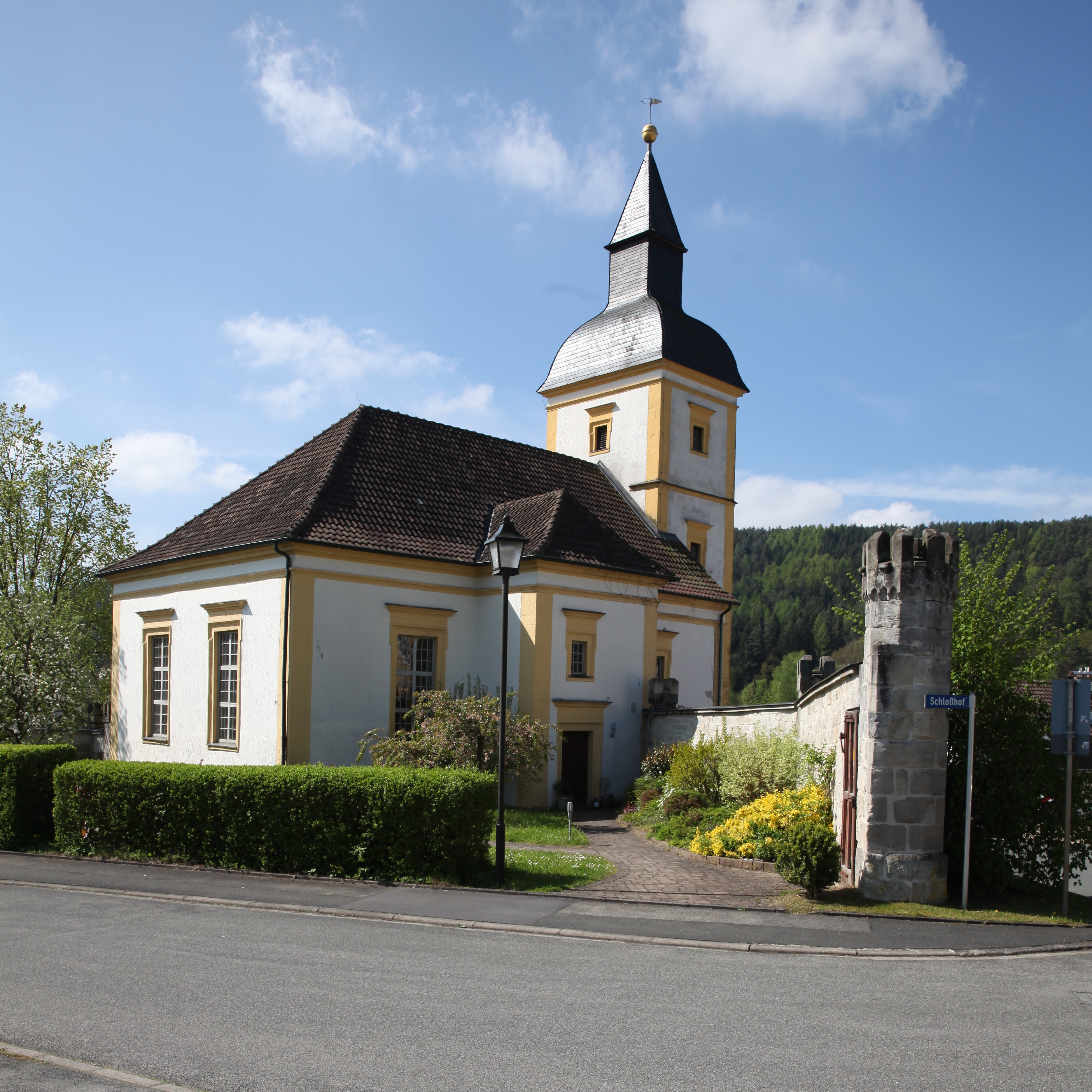 Schlosskirche in Hassenberg